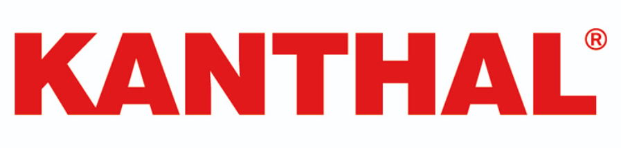 Kanthal logo